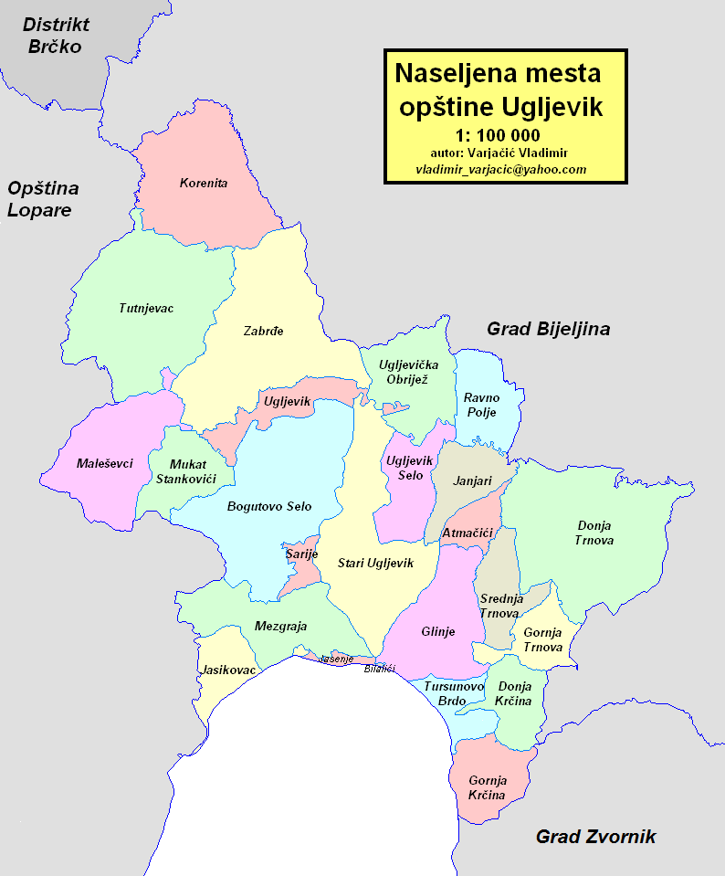 Opština Ugljevik